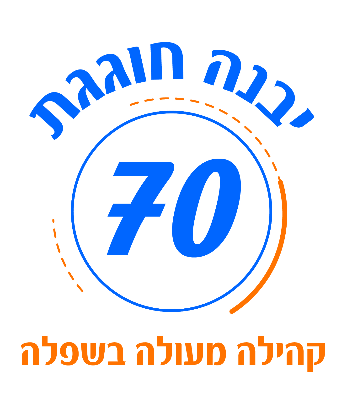 לוגו לשנת ה-70 לעיר יבנה